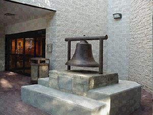 historic Round Rock Volunteer Fire Dept. Bell